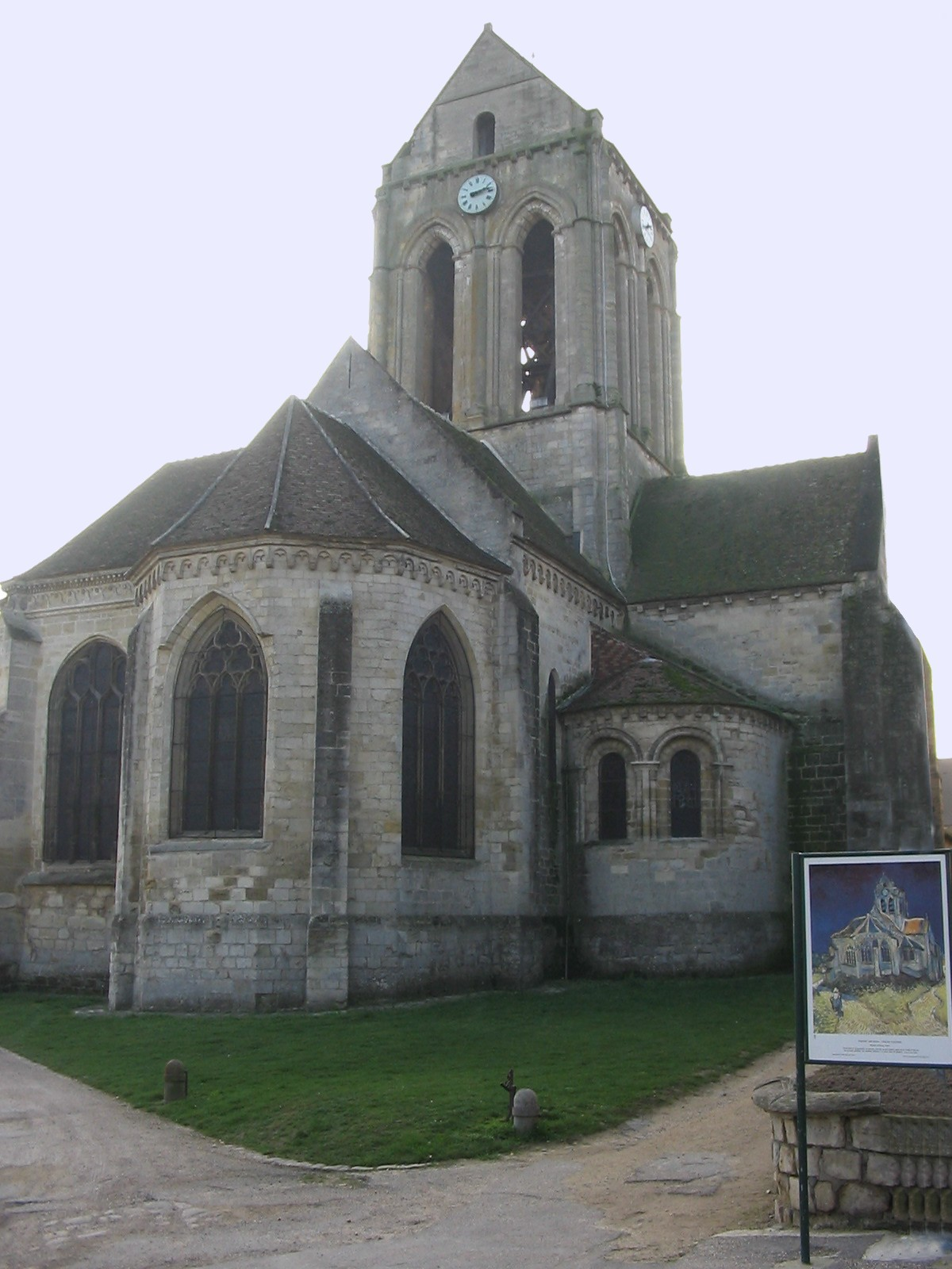 Eglise d'Auvers-sur-Oise